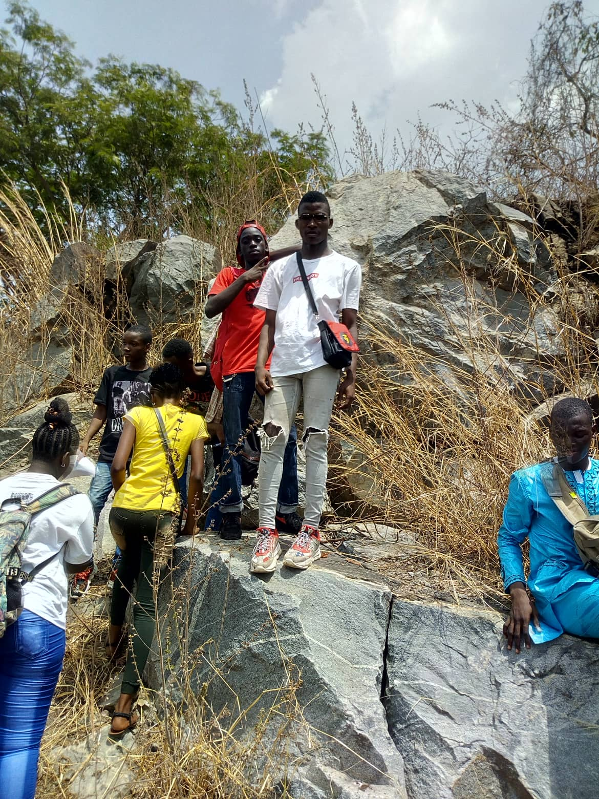 cette photo a été prise sur les collines de dassa au Bénin un sortie entre des potes pour s'amuser et changer d'air et connaitre notre pays et aussi étudier les phénomene volcanique qui on donné naissance au colline et montagne This is an image with the theme "Play" from: Benin